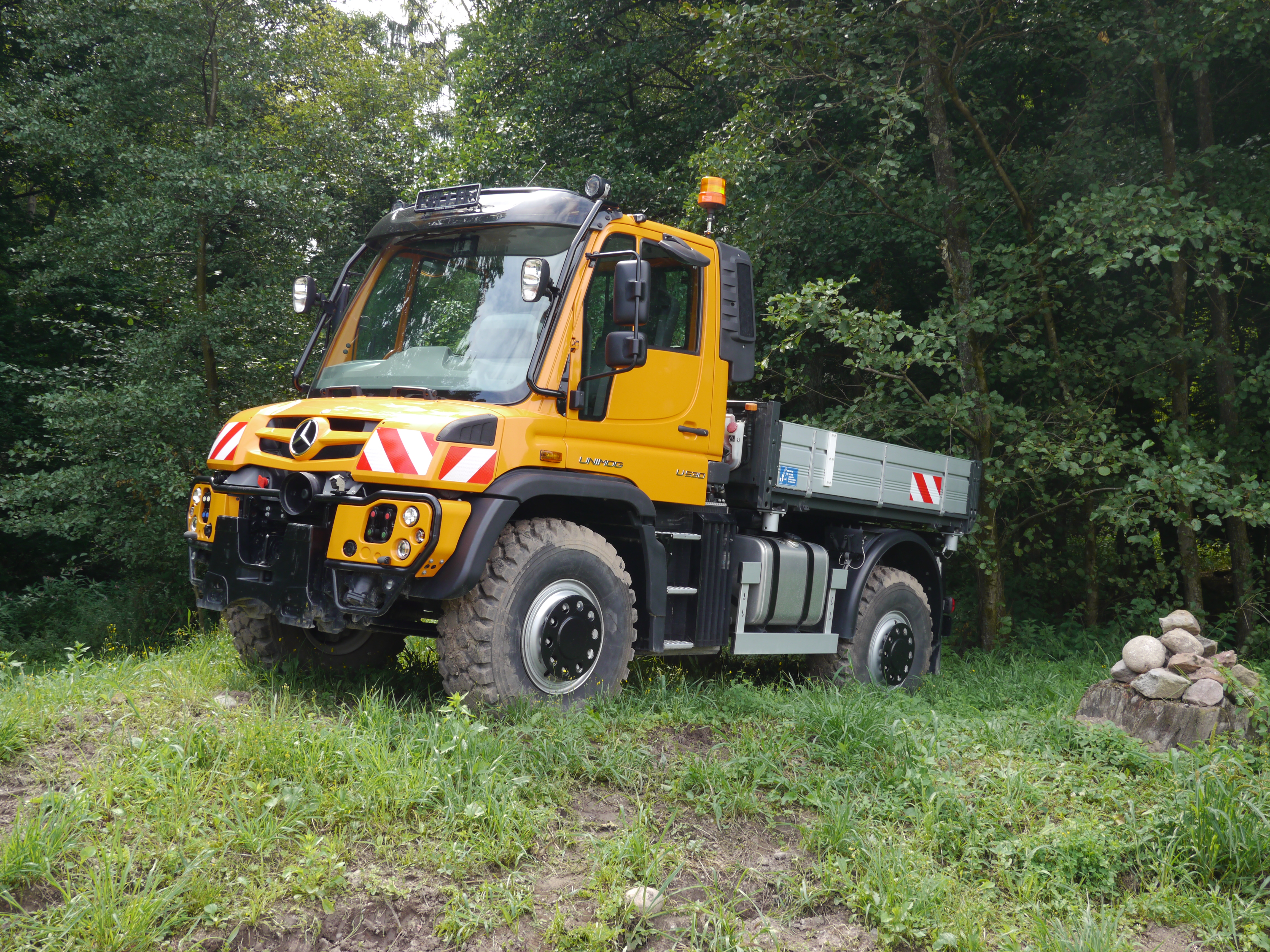 Unimog-Museum Weltenbummlertreffen 2017 06